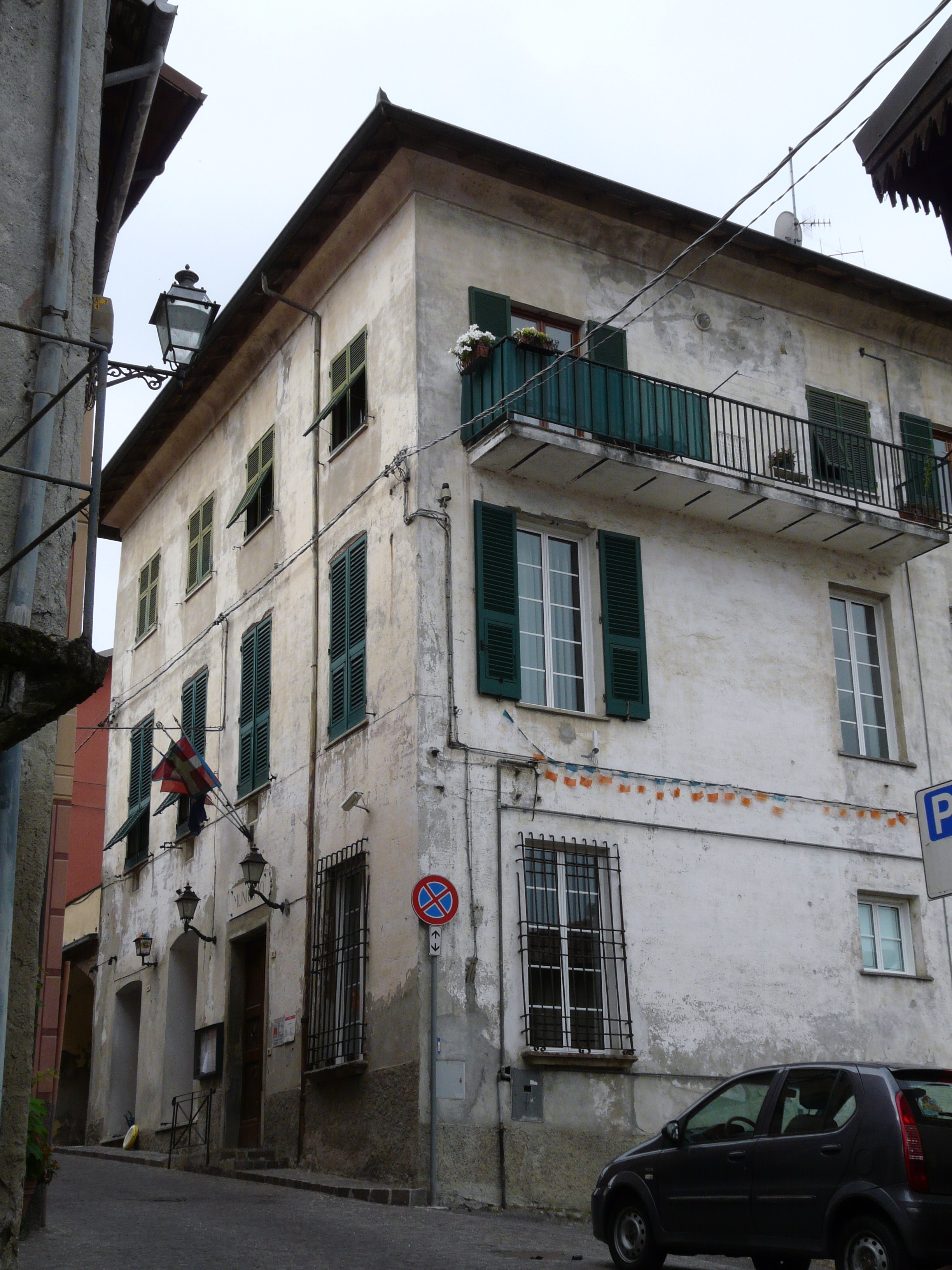 Municipio di Carrosio, Piemonte, Italia